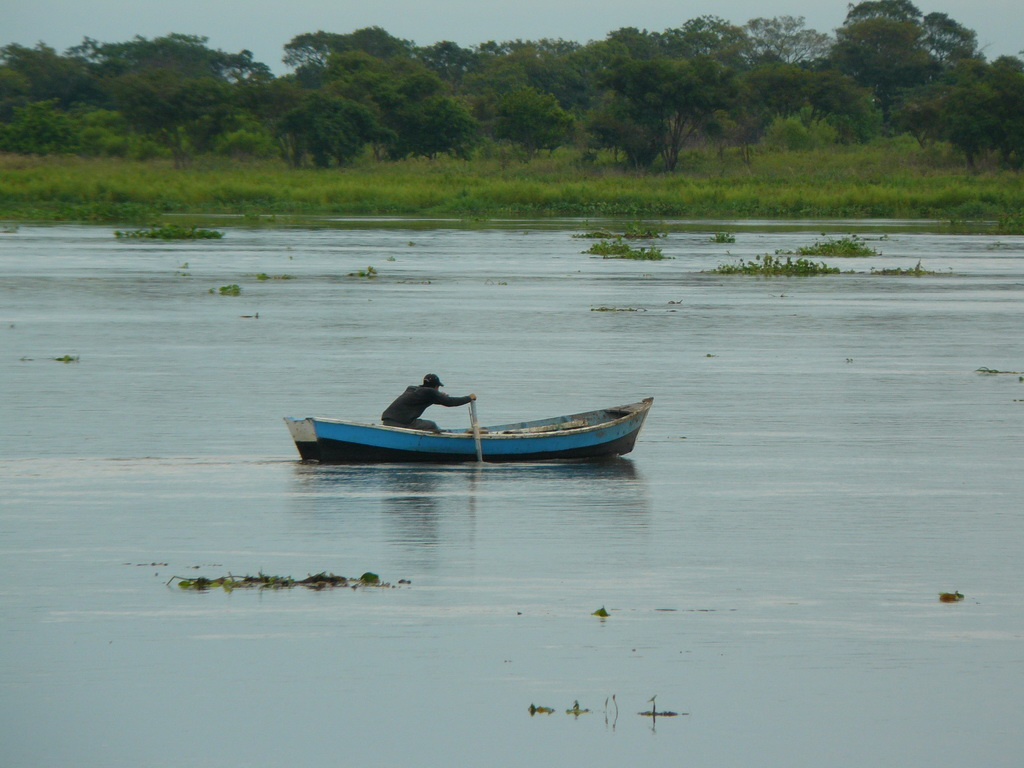 Villeta. Orillas del Rio Paraguay